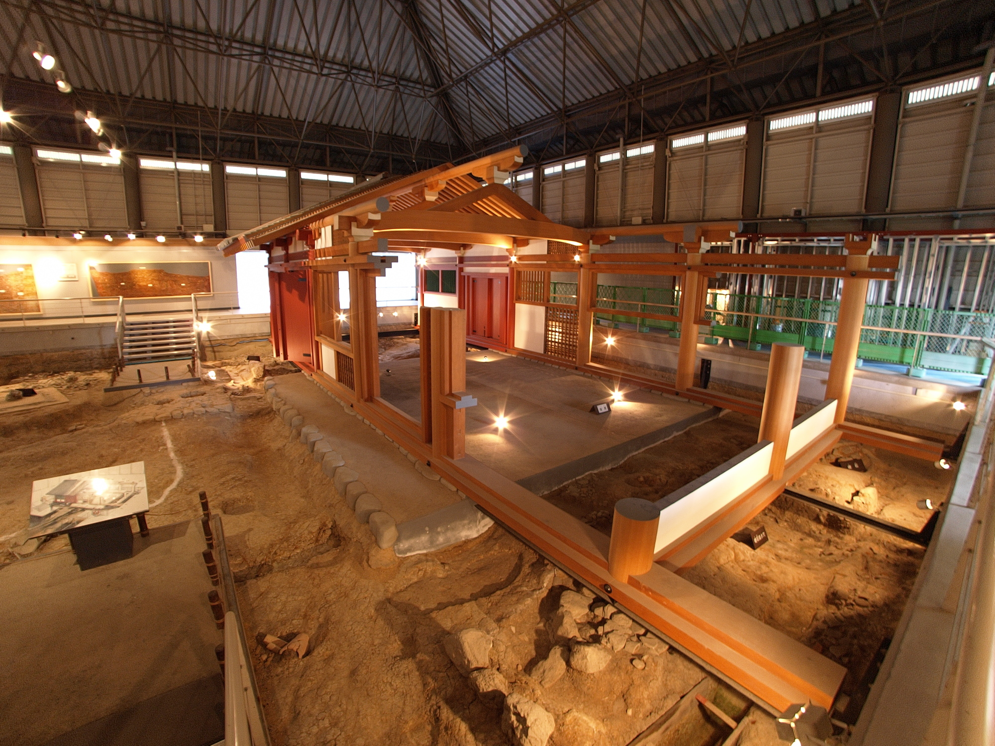 福岡市中央区、鴻臚館跡展示館内にある展示物。